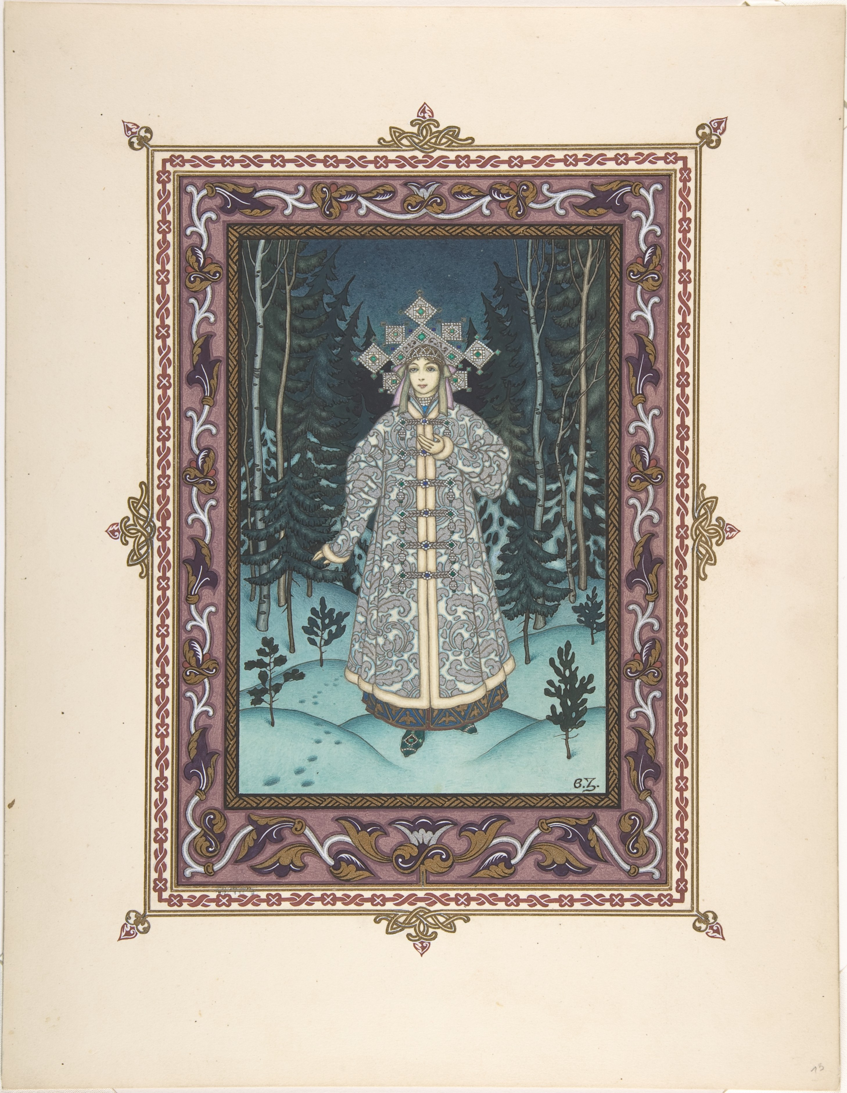 Drawing; Drawings